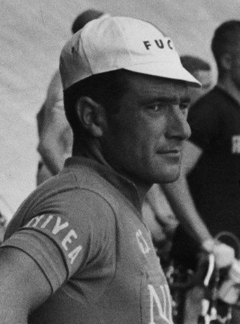 Start Ronde van Nederland Stadion Utrecht . Italiaanse ploeg (Nivea) kopman Fiorenzo Magni